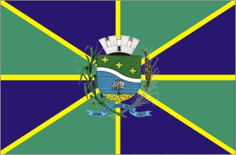 Bandeira do município de Ipeúna - SP - Brasil.